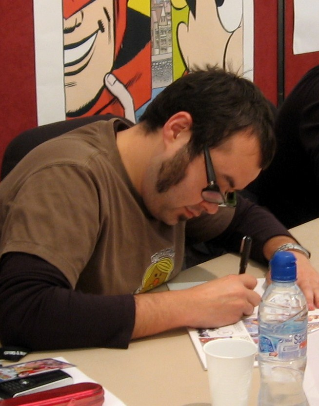 Albert Monteys en el Salón del Cómic de Getxo 2006.